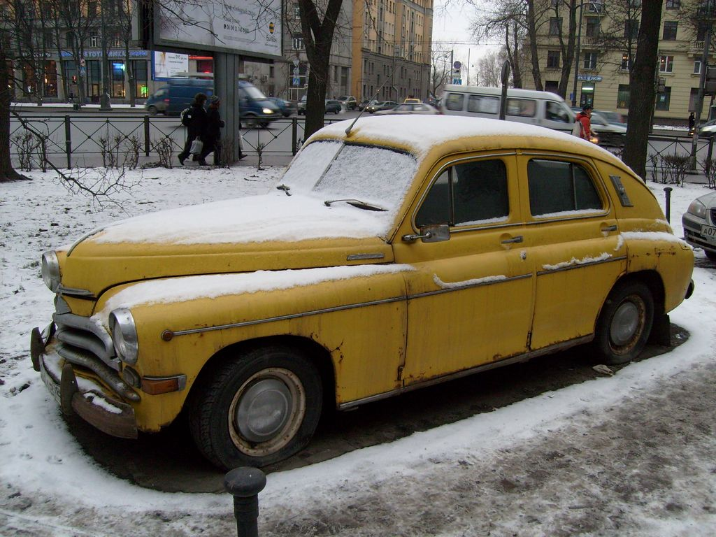 Машина «Победа». Петербург, 2008